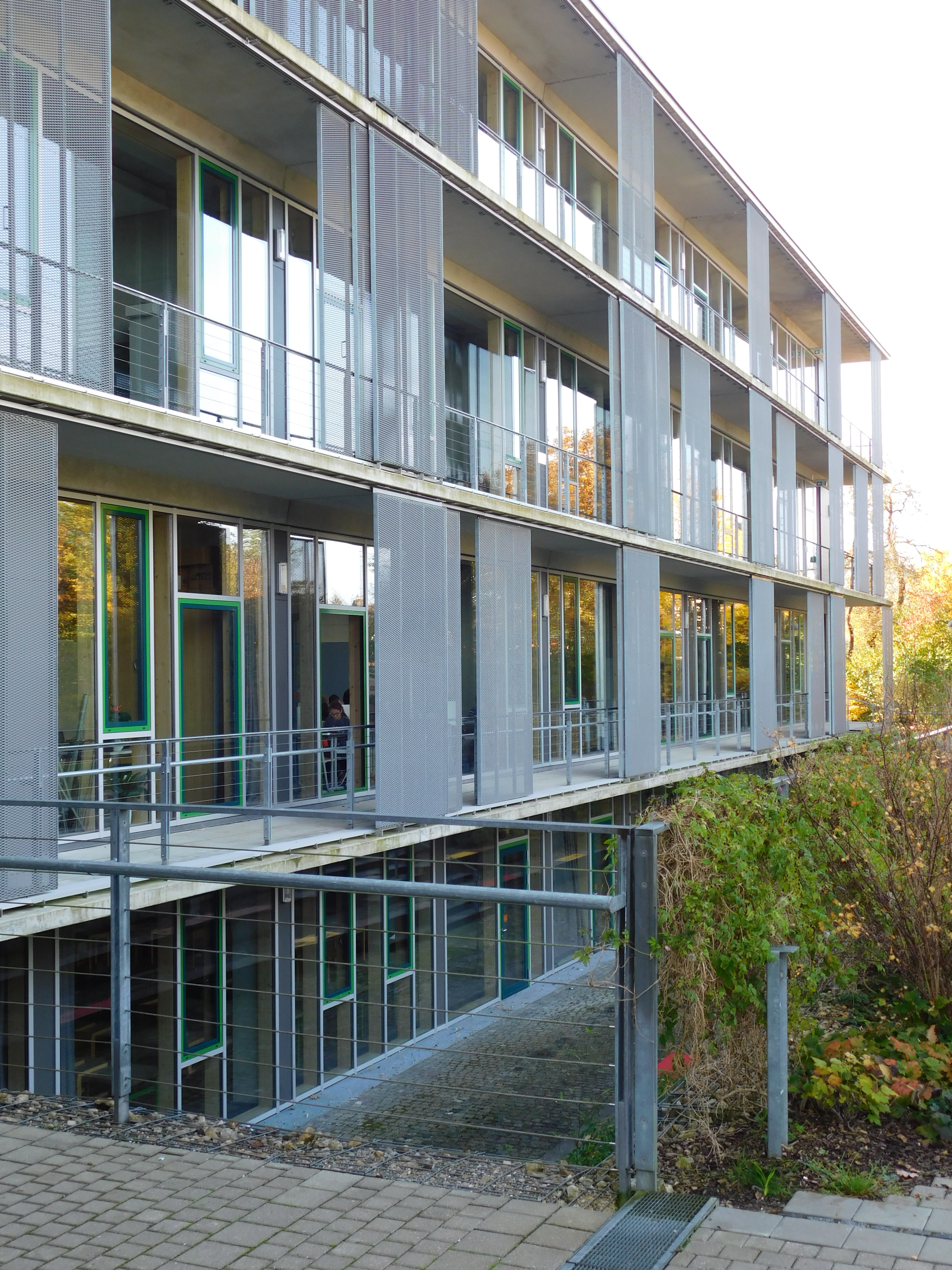 Christoph-Probst-Gymnasium Gilching Bayern Deutschland Westseite.